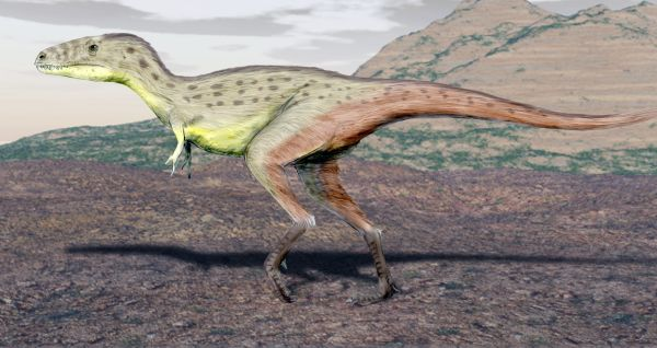 Raptorex, como a tiranosaurio a la superior, digitale